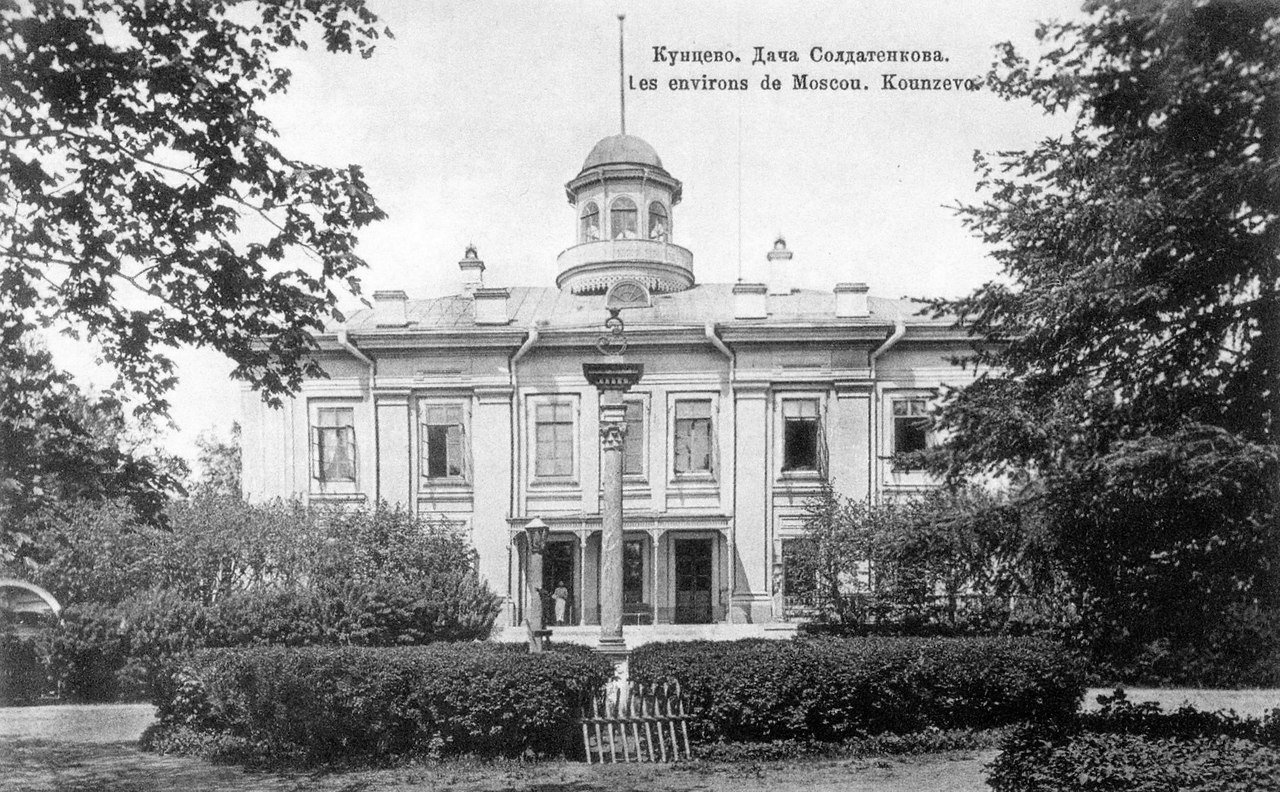 Главный дом подмосковной усадьбы Кунцево